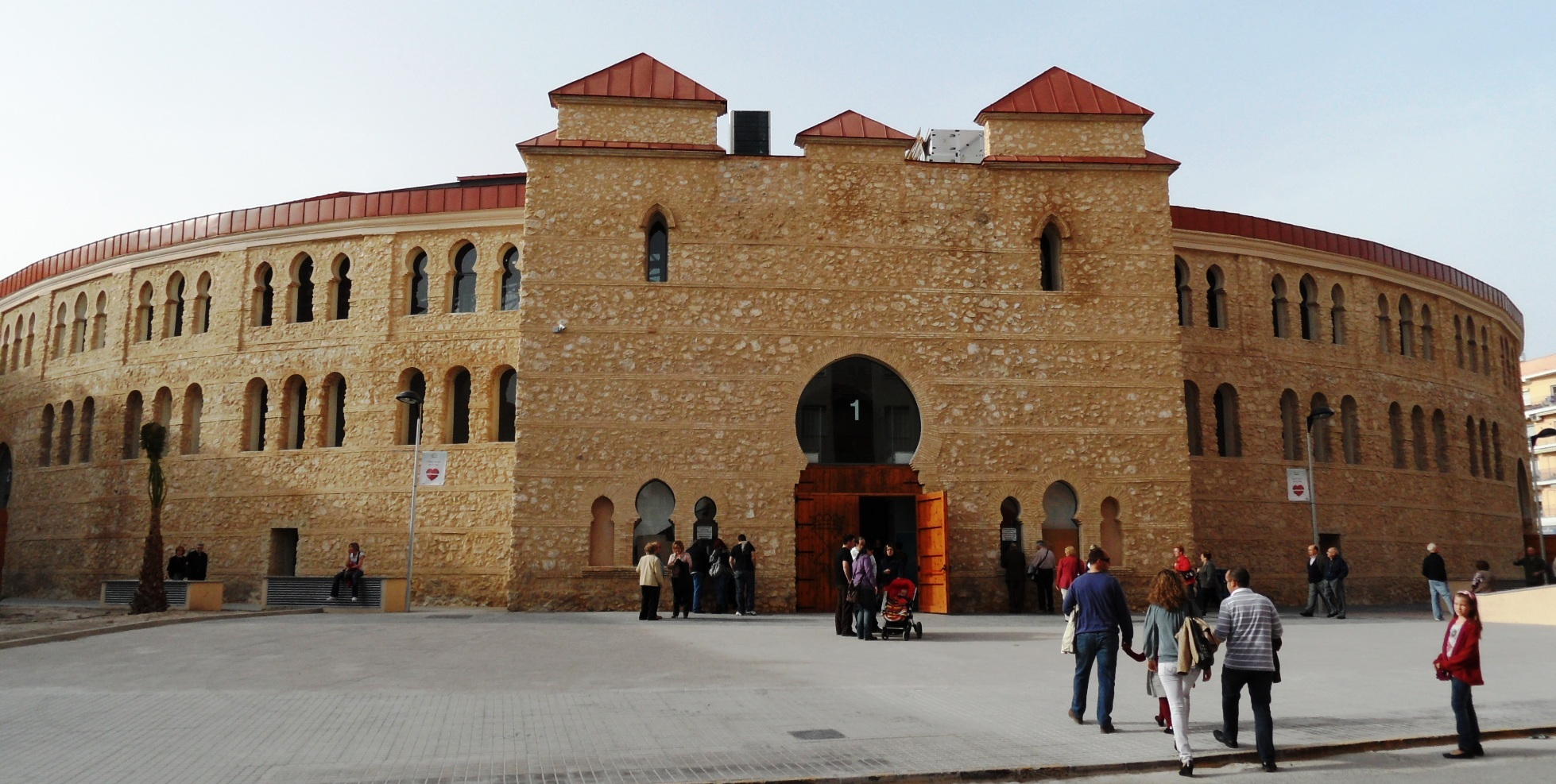 Puerta grande de la Plaza de Toros de Villena.